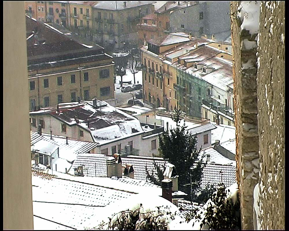 Singolare vista del centro di Castel di Sangro